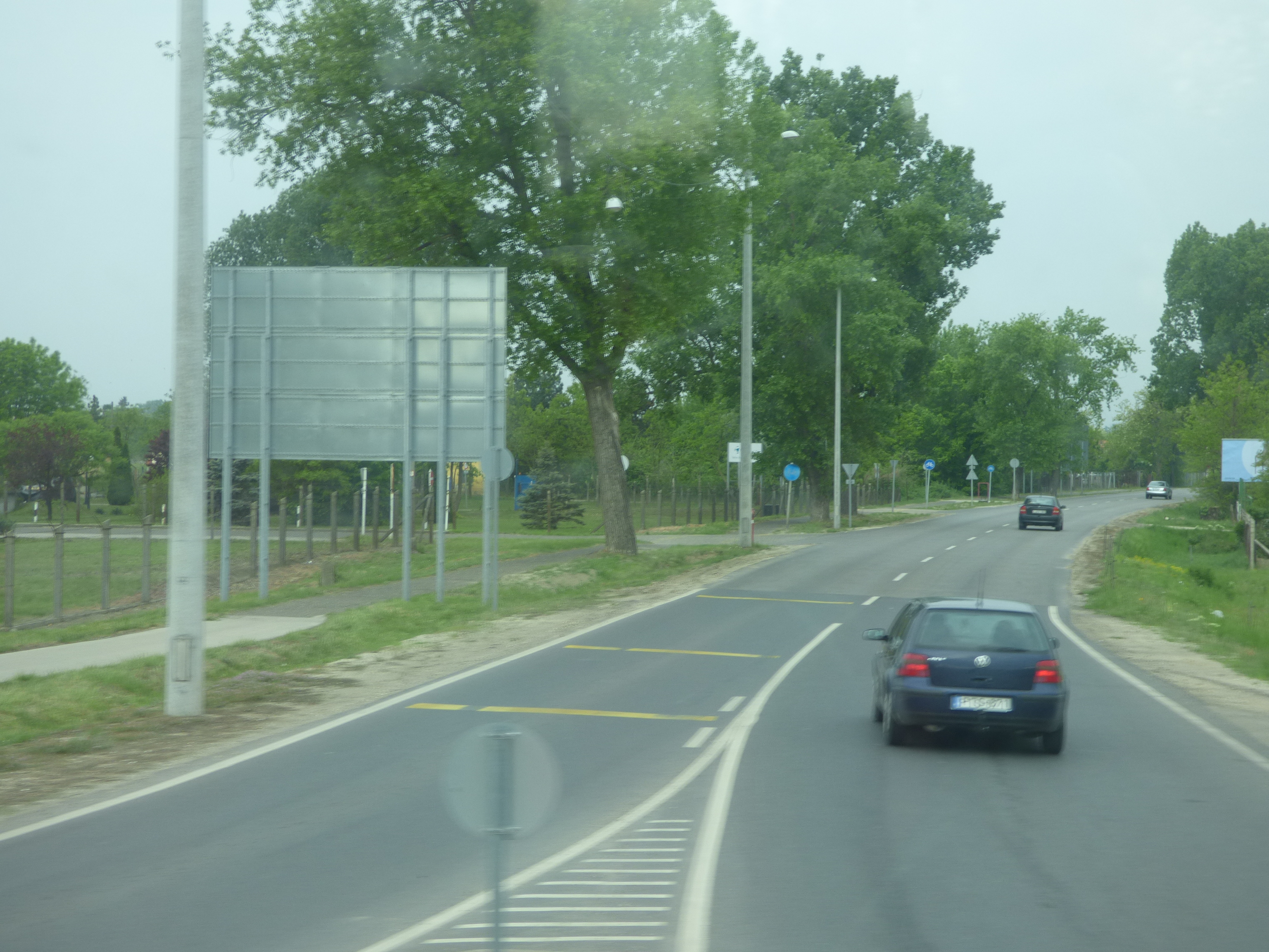 A kecskeméti Reptéri út a 445-ös főút körforgalma felől nézve